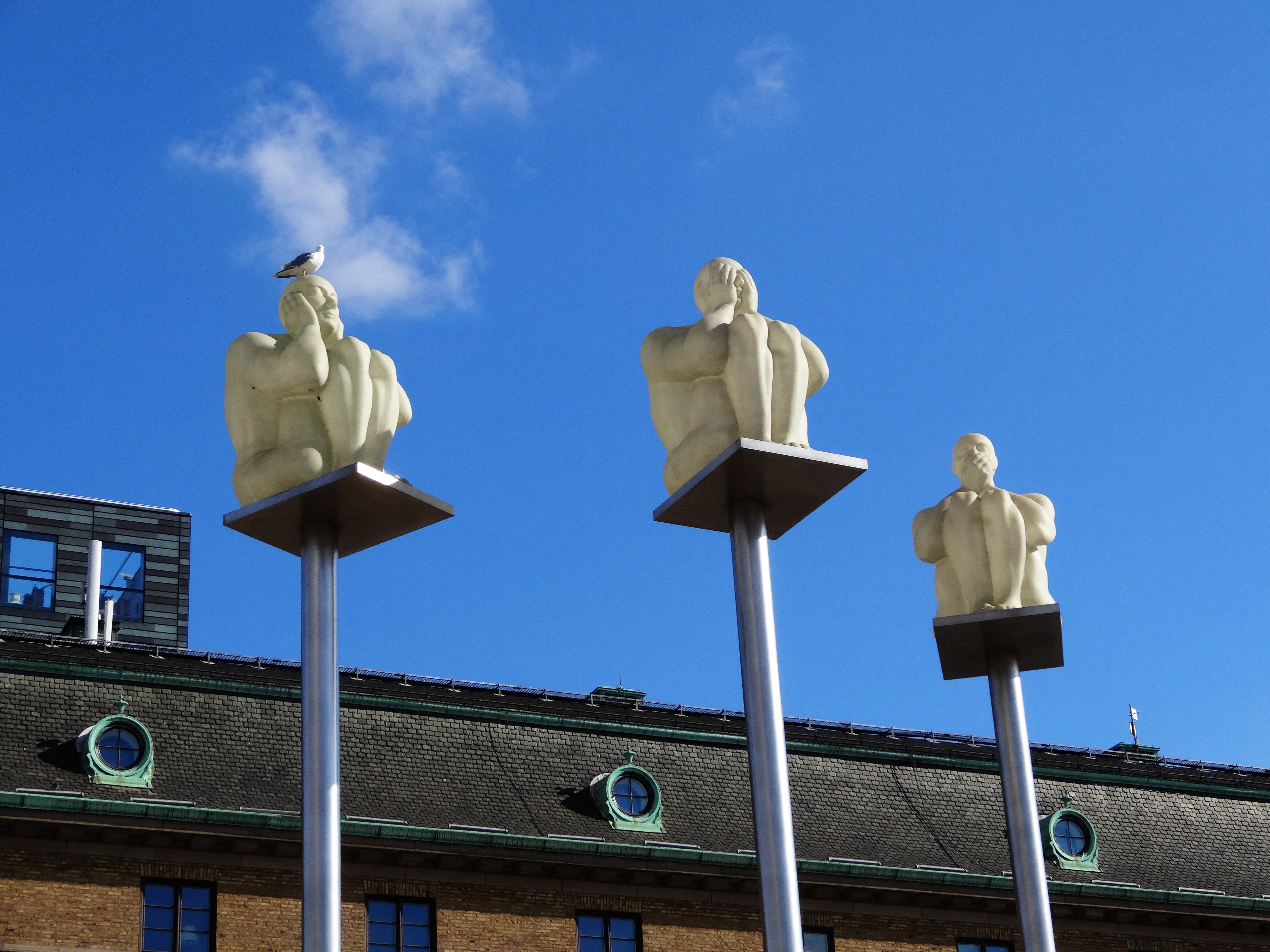 Skulpturgruppen Dröm av Jaume Plensa, uppförd den 26 januari 2012, på Drottningtorget i Göteborg.